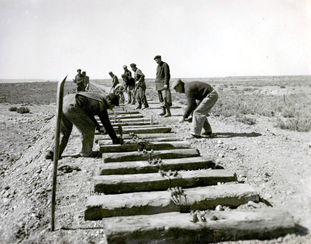 Trabajadores ferroviarios, 1952. Inventario 245742. General Archive of the Nation Native nameArchivo General de la Nación ArgentinaParent institutionPoder Ejecutivo Nacional LocationBuenos Aires, ArgentinaCoordinates34° 36′ 17″ S, 58° 22′ 14″ W Established28 August 1821Web pageAGNAuthority control : Q2860529 VIAF: 158621023 ISNI: 0000 0001 2375 5869 LCCN: n82144709 NKC: kn20121211004 WorldCat institution QS:P195,Q2860529 This file, was provided to Wikimedia Commonsthanks to an agreement between the General Archive of the Nation of Argentina and Wikimedia Argentina.